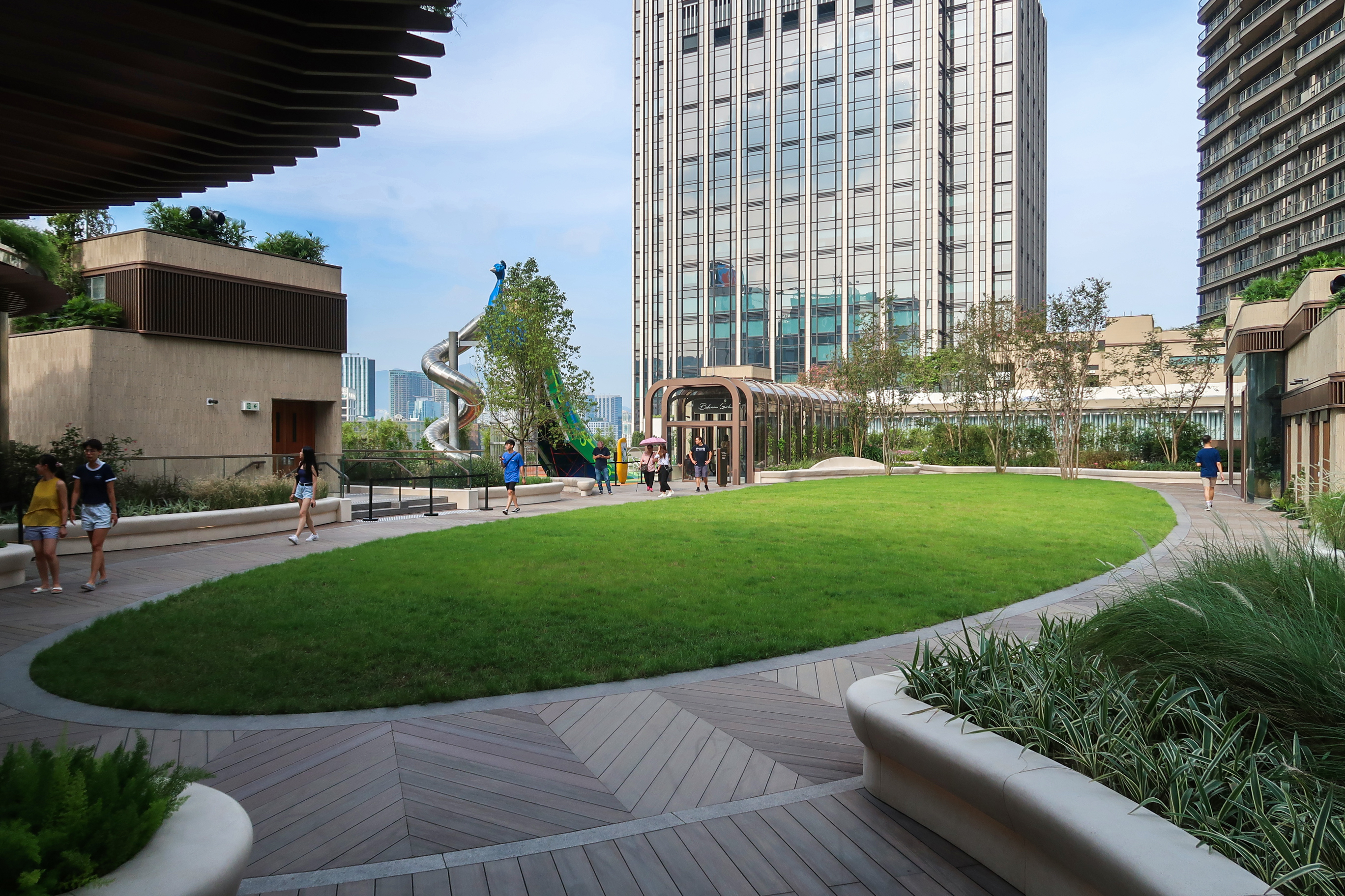 K11 MUSEA Level 7 Bohemian Garden